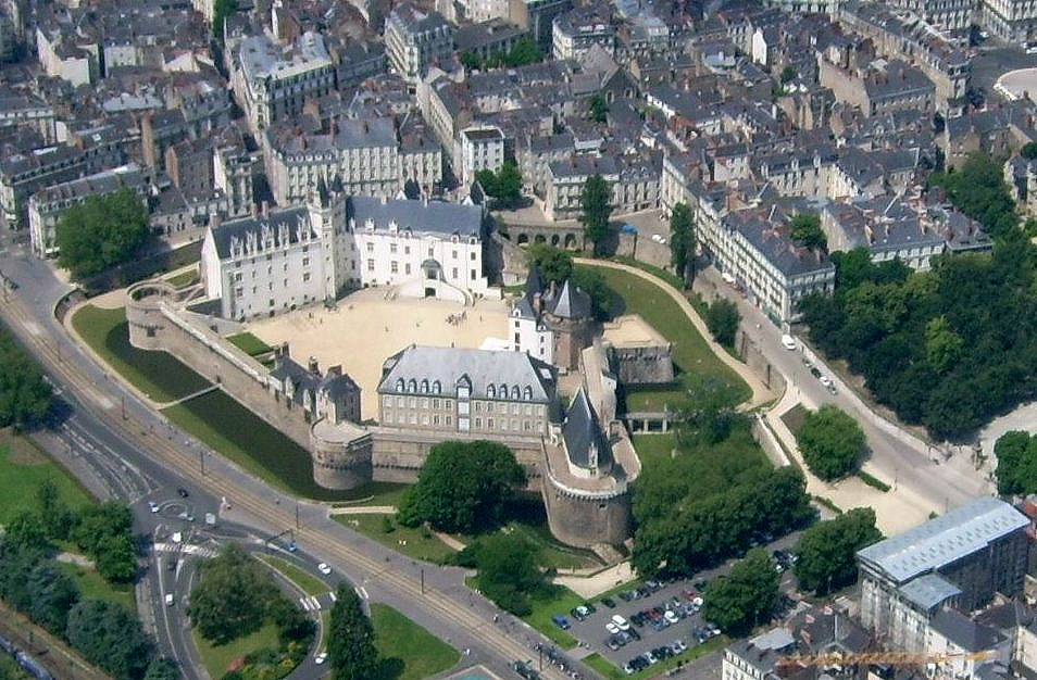 Vue aérienne du château des ducs de Bretagne (Nantes, France)